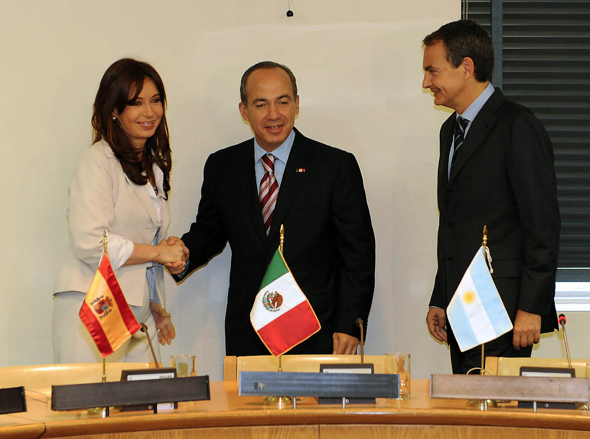 La presidenta Cristina Fernández, junto a sus pares de España, José Luis Rodríguez Zapatero, y México, Felipe Calderón